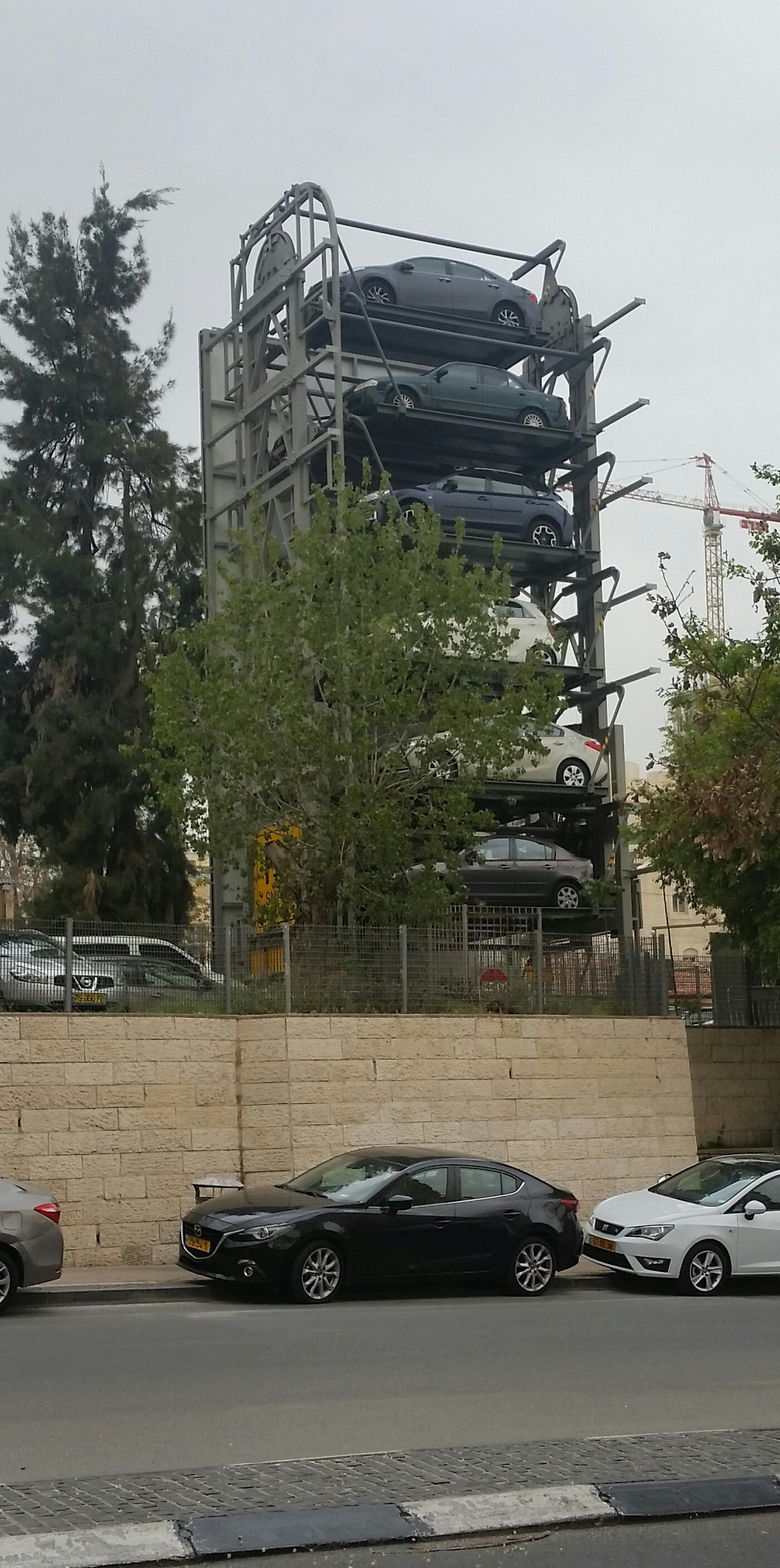 גלגל חנייה בעיר ירושלים, ישראל